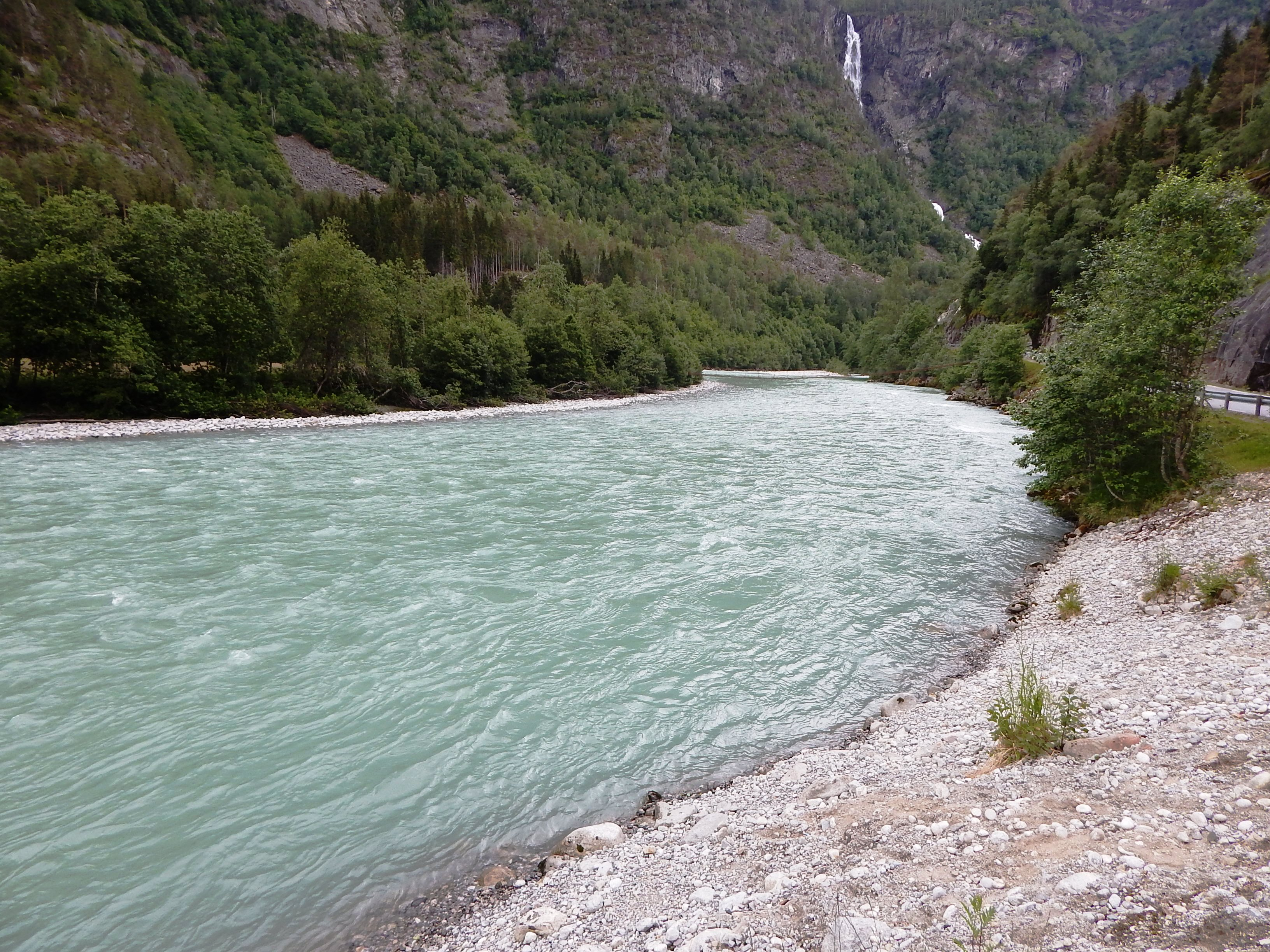 Jostedøla i Jostedalen